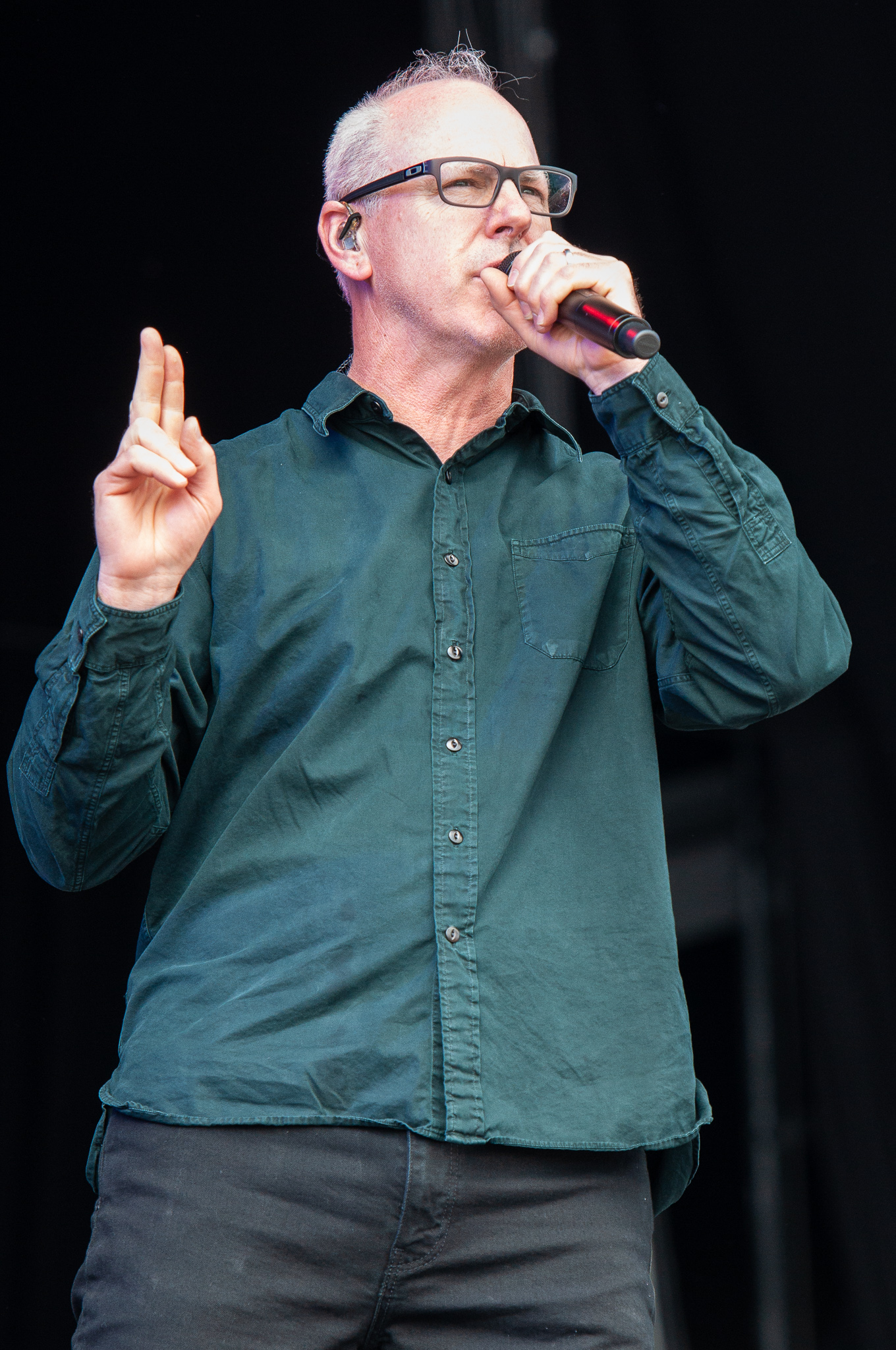 ARGO-Konzerte,Bad Religion,Festival,Greg Graffin,Konzert,Livekonzert,Livemusik,Musik,RiP,Rock im Park 2018,Zeppelin Stage